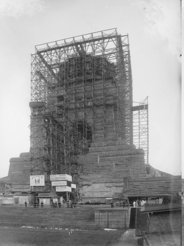 Bau Völkerschlachtdenkmal, Gesamteinrüstung, 1912